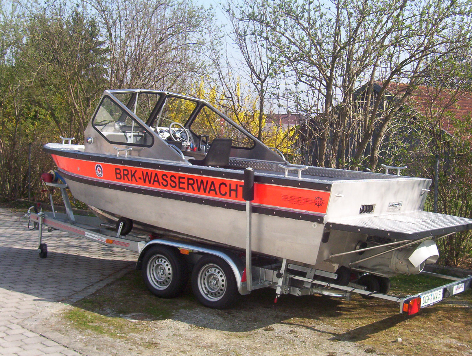 Jetboot der Wasserwacht Reisbach mit Plattform am Heck, auf Transportanhänger